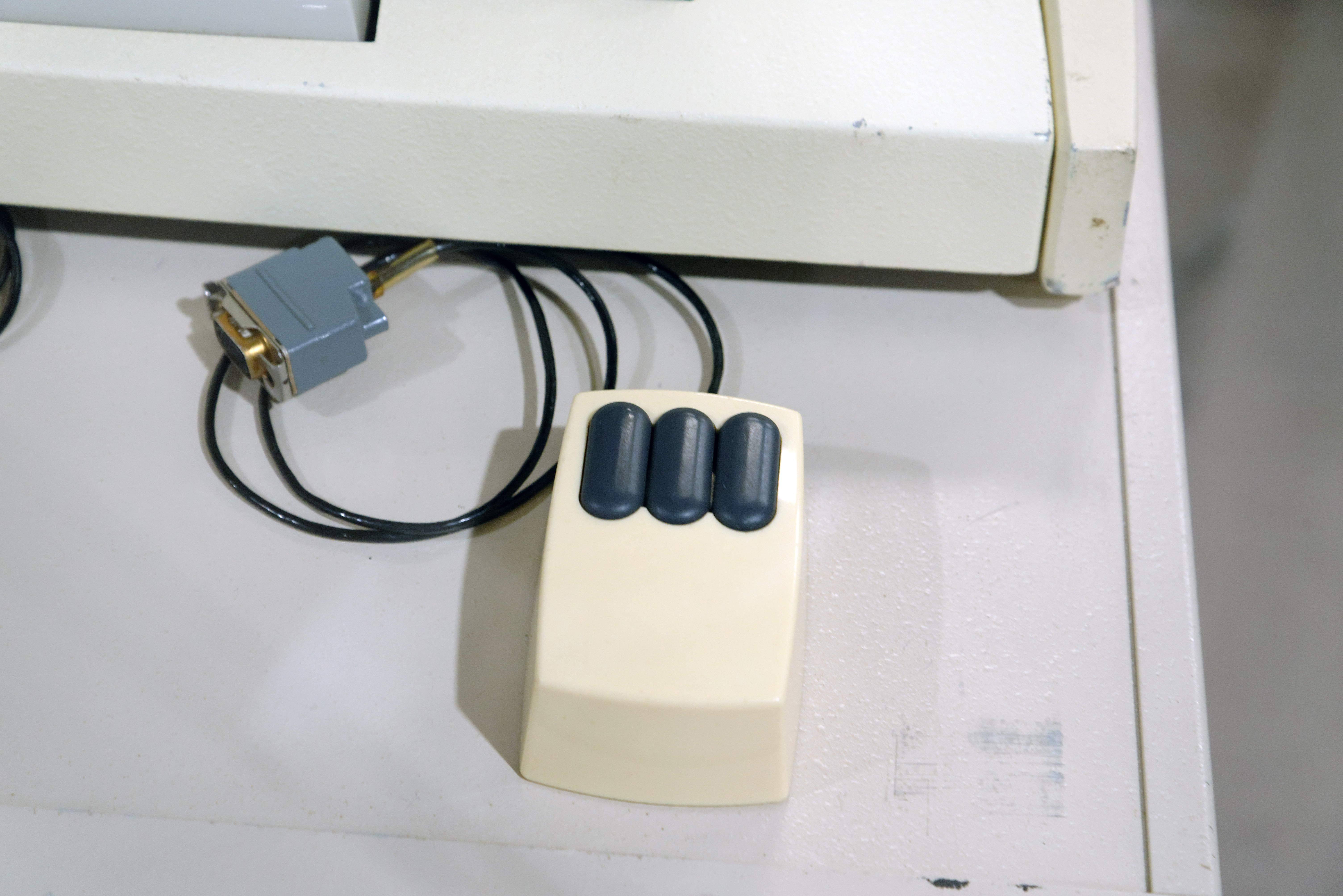 Xerox Alto computer mouse